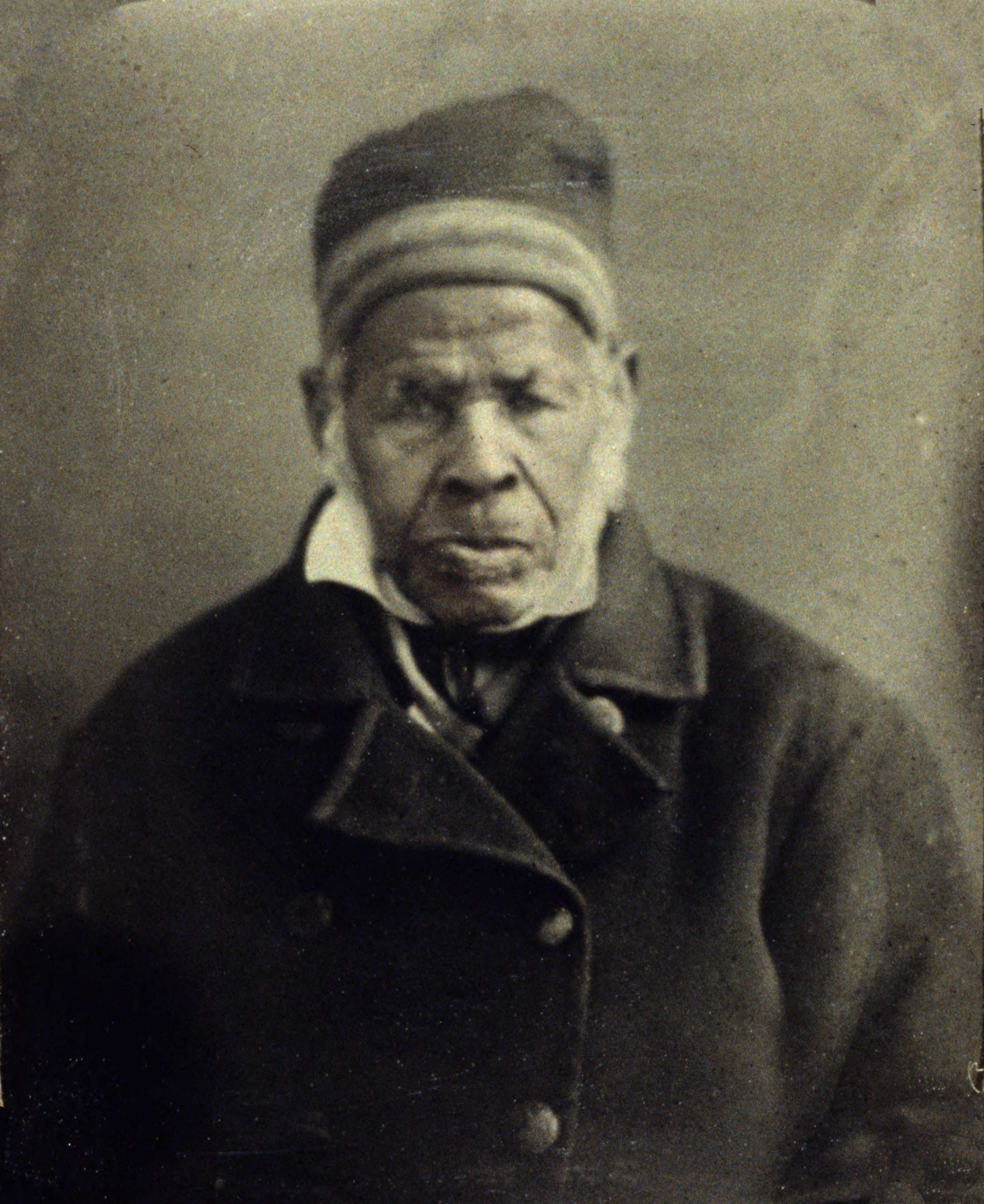 Omar Ibn Said